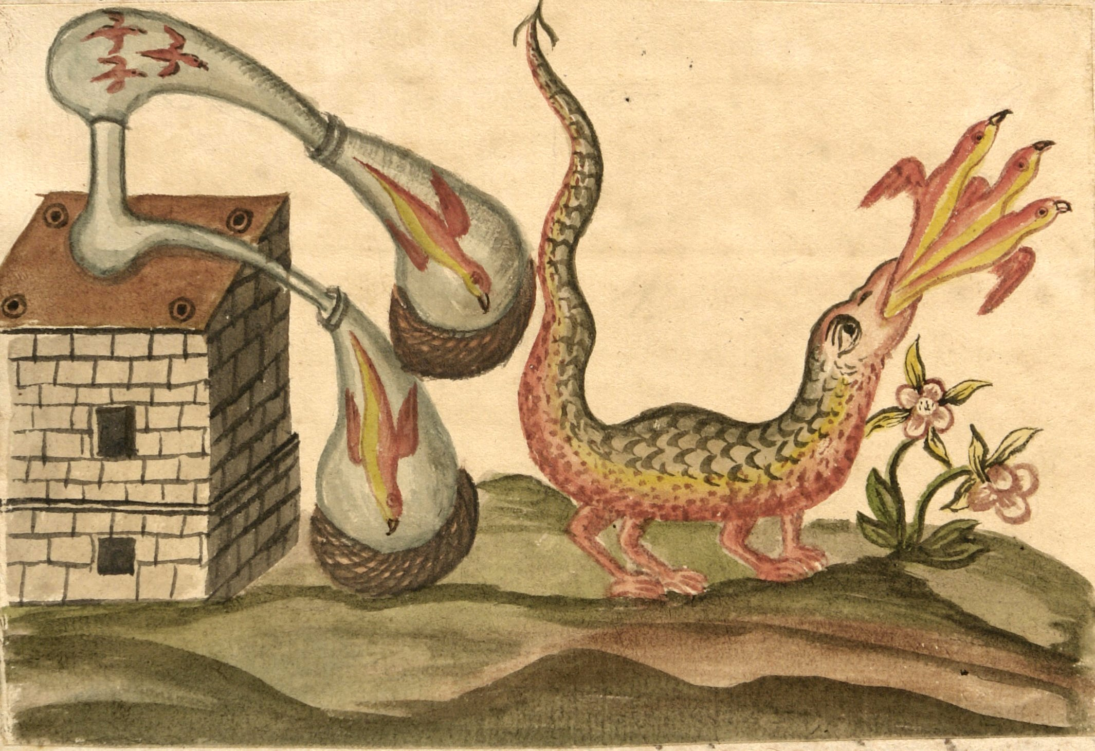 Immagine del manoscritto Zoroaster Clavis Artis, Ms-2-27, Biblioteca Civica Hortis, Trieste, vol. 2, pag. 22